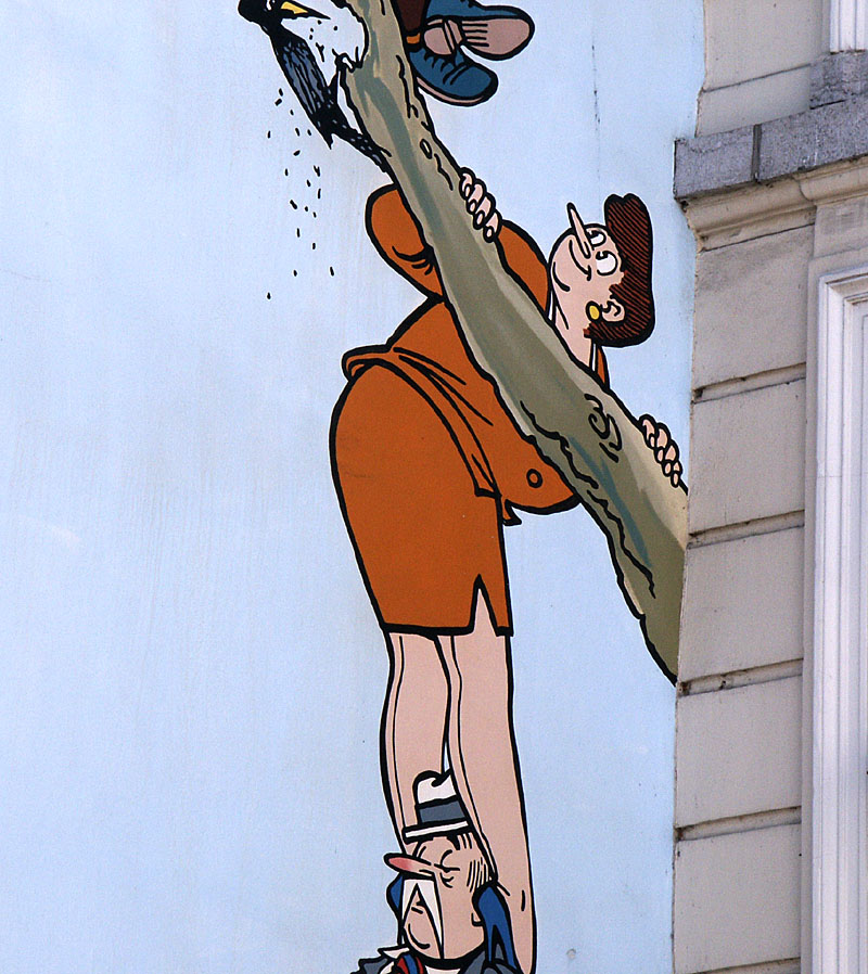 Madam Pheip op de Nero-muurschildering in Brussel